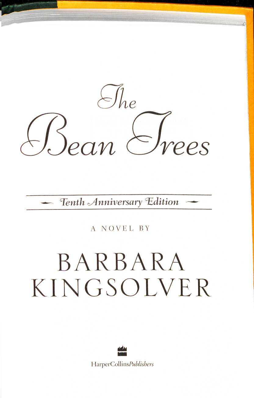 Barbara Kingsolver The Bean Trees 1988 Title